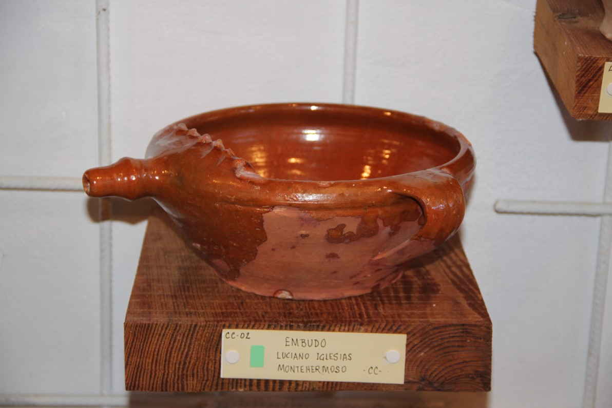 Embudo para aceite, vidriado y decorado. Pieza tradicional de la alfarería de basto de Montehermoso, en la provincia de Cáceres (Extremadura, España). Alfar de Luciano Iglesias.